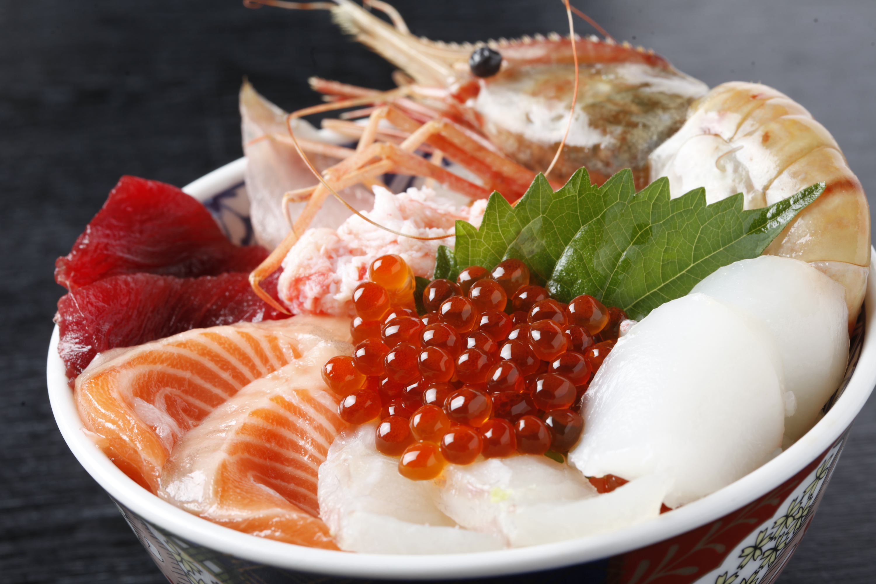 大盛り海鮮丼